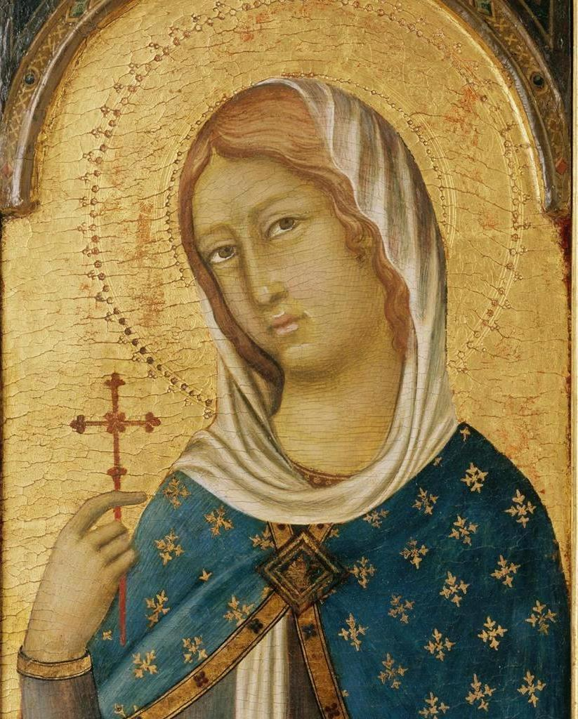 detail